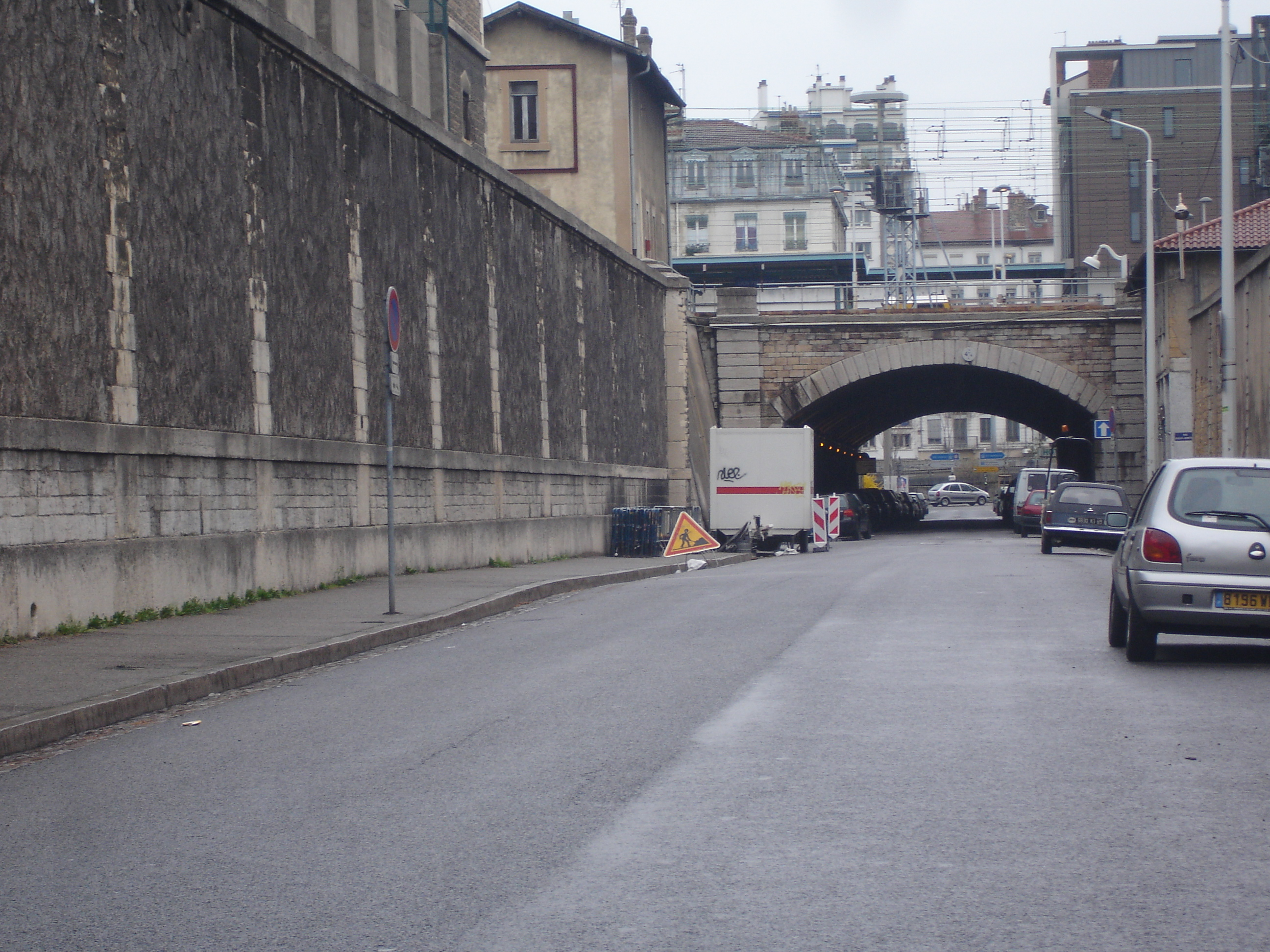 Lyon-Confluence : Les voûtes vues de la rue Delandine